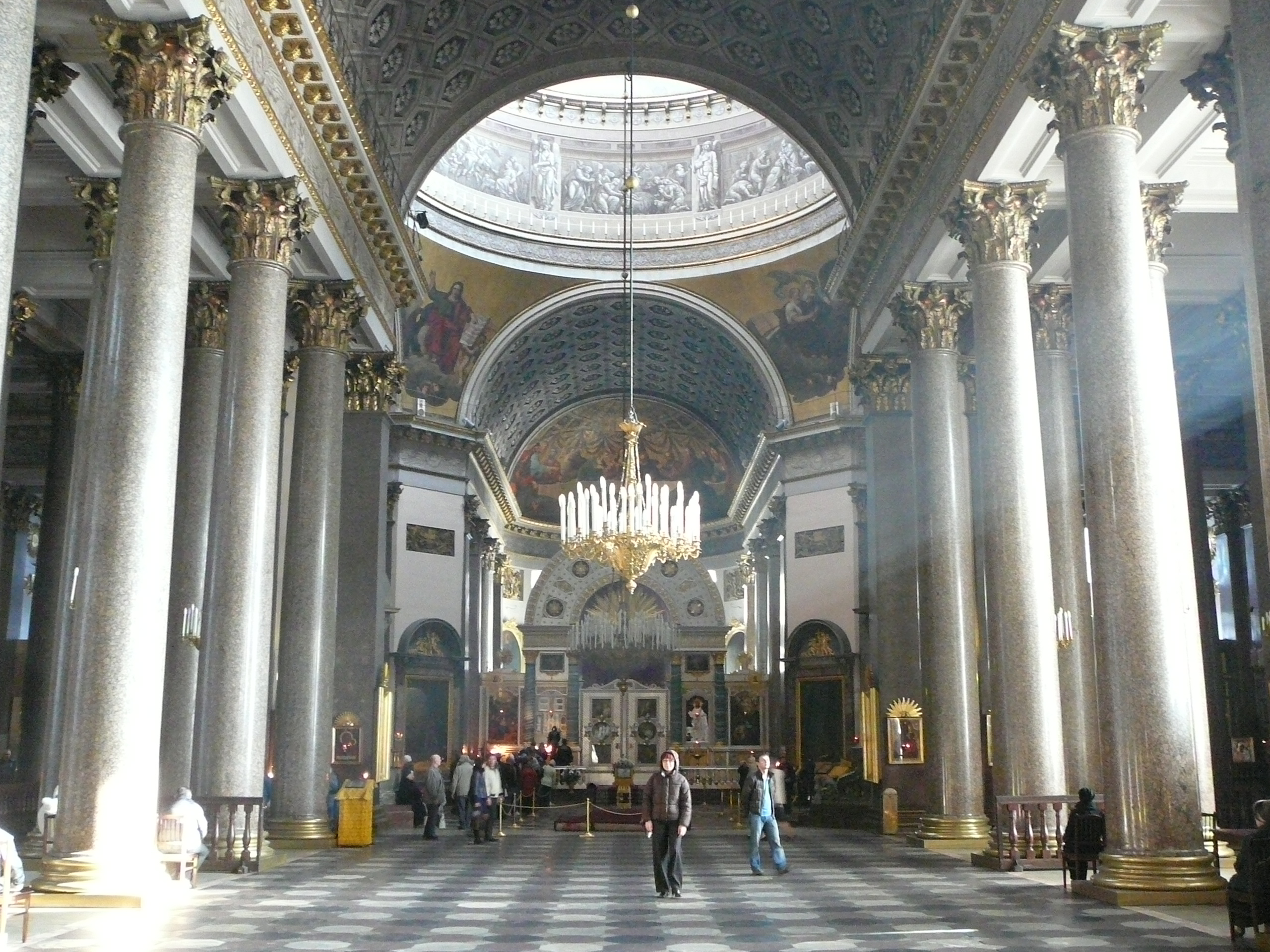 Внутреннее убранство Собора Казанской иконы Божией Матери (г. Санкт-Петербург)